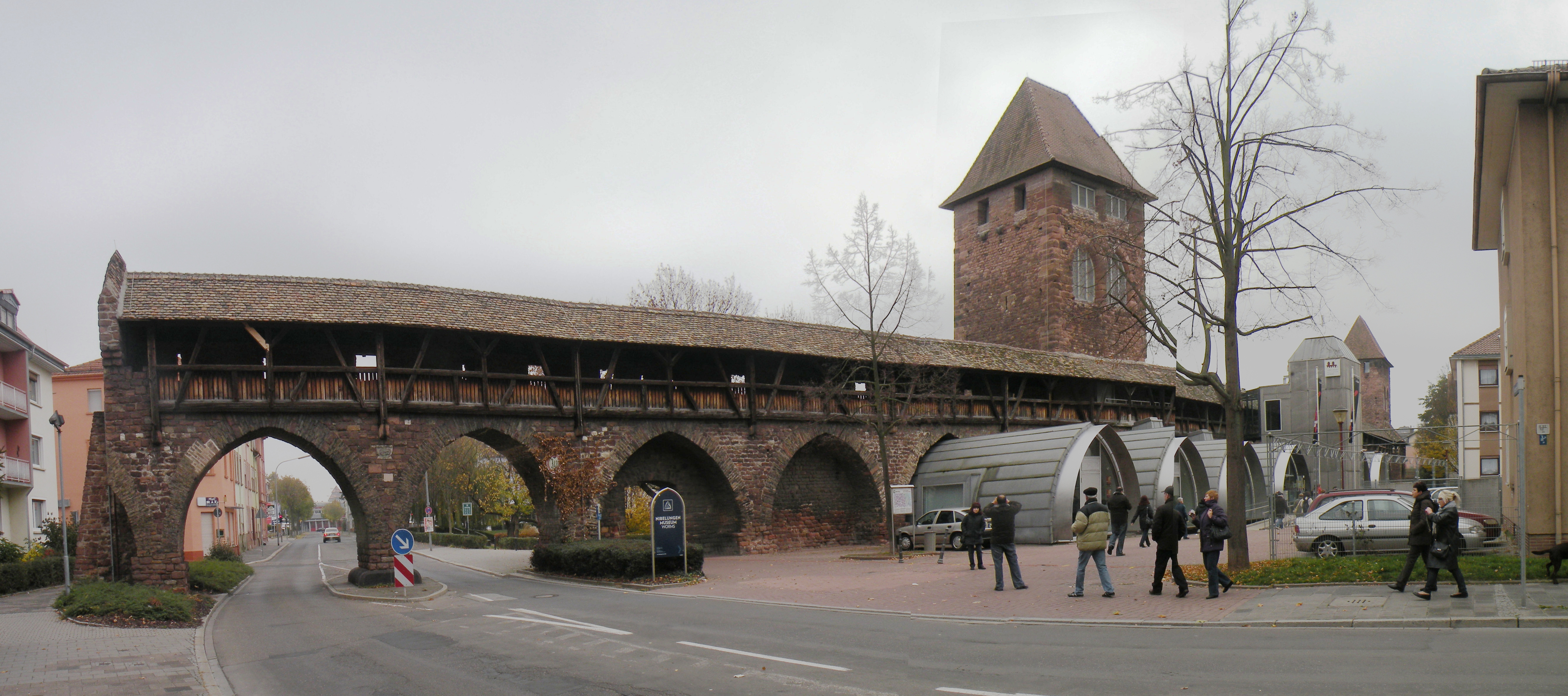 Nibelungenmuseum.Worms